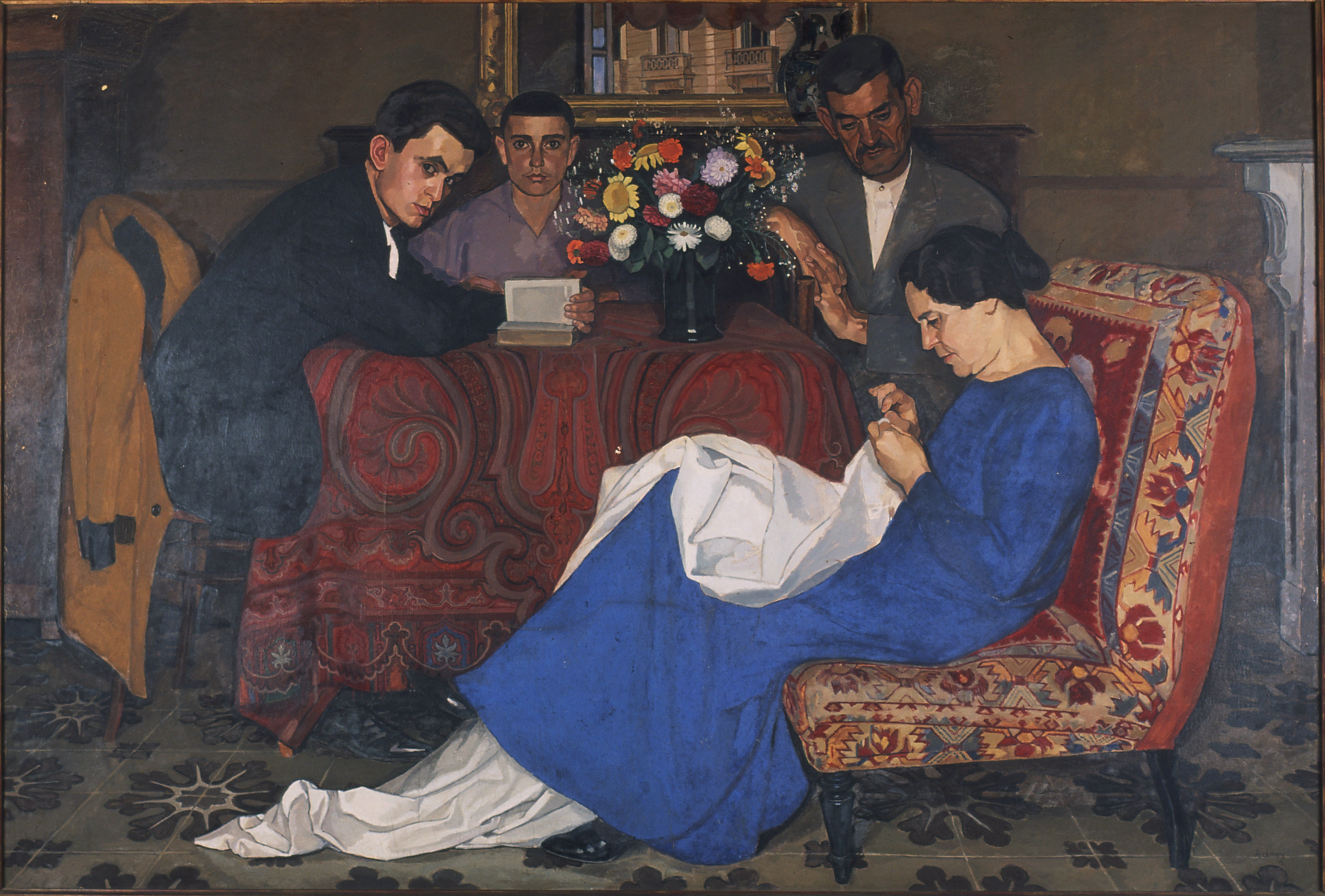 photo1